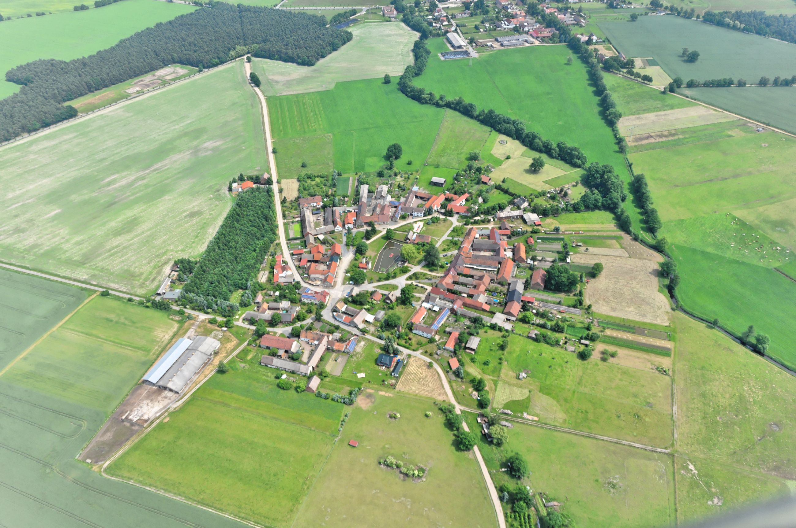 Überführungsflug vom Flugplatz Schwarzheide-Schipkau über Potsdam, Lüneburg zum Flugplatz Nordholz-Spieka